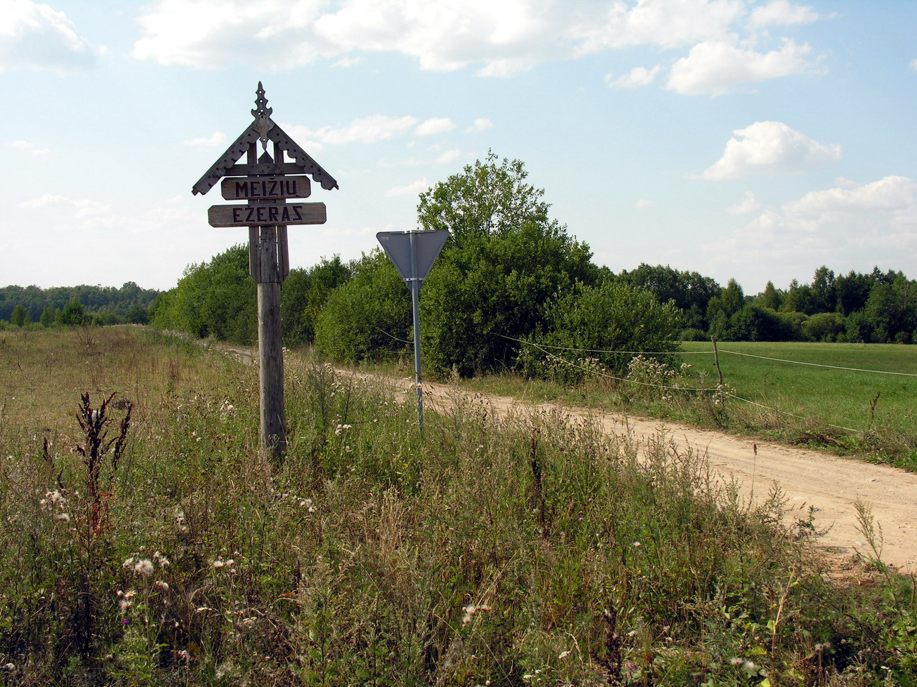 Meižiai, Mažeikių raj., Viekšnių seniūnija Lenta ir kelias prie Meižių ežero Foto: Algirdas, 2006 m. rugpjūčio 11 d., Lietuva